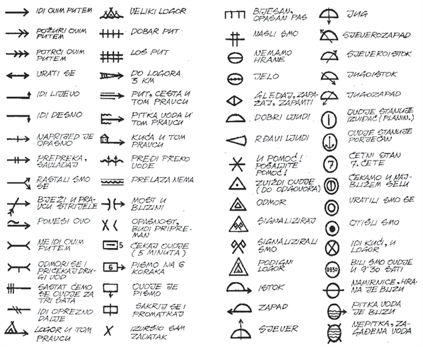 Putni znaci